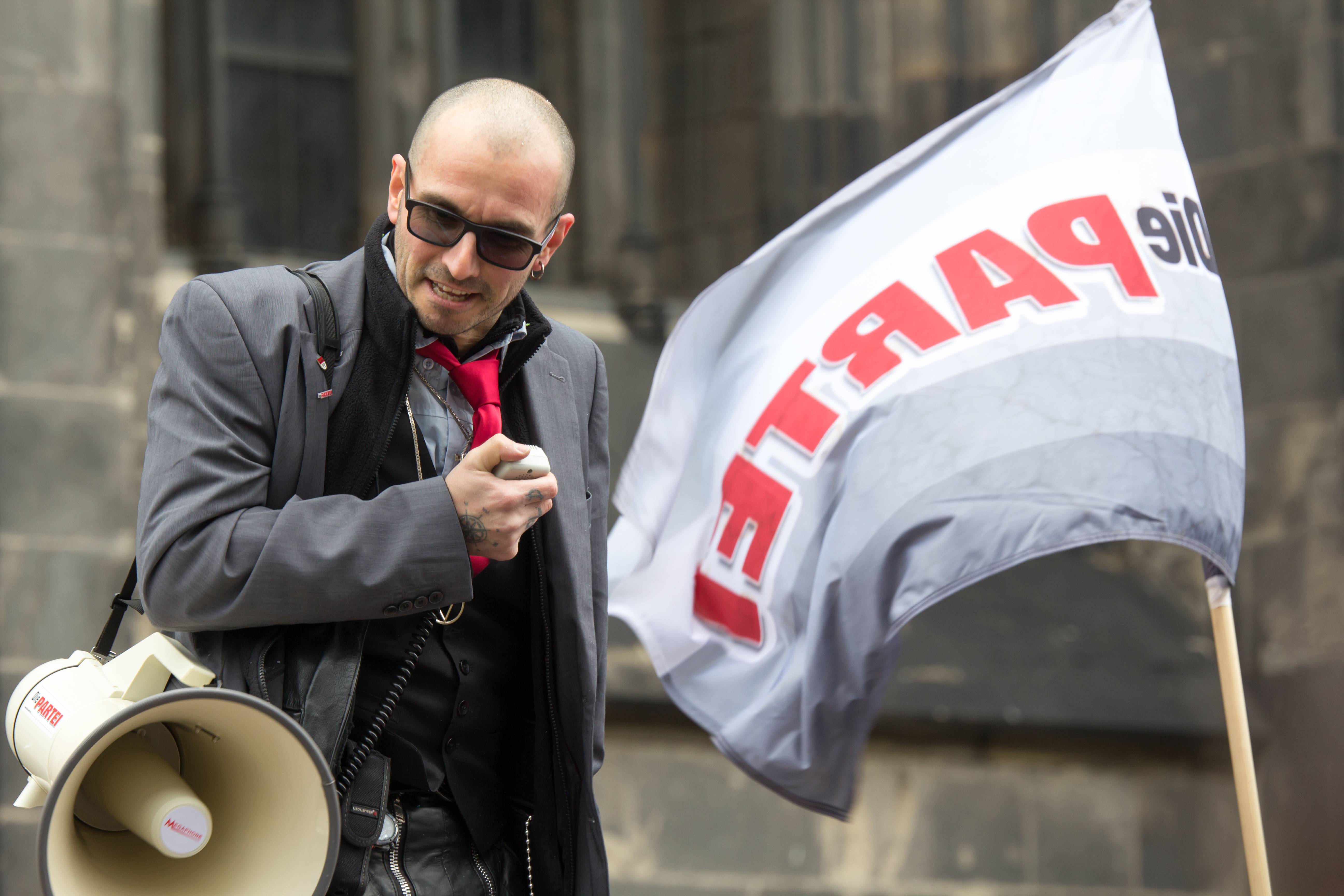 Mark Benecke auf dem Kölner Roncalliplatz bei einer Wahlkampfaktion der PARTEI am 17.10.2015